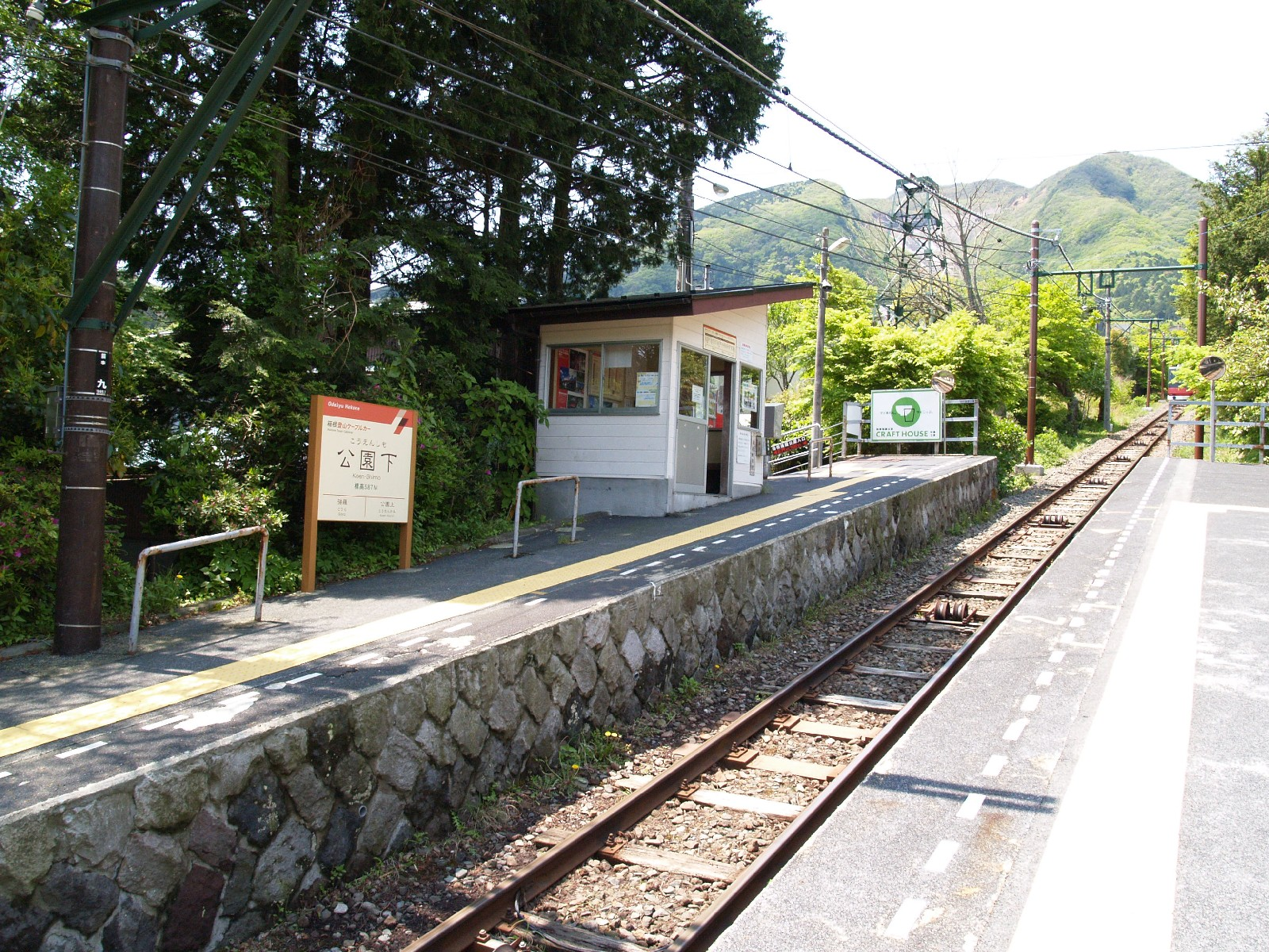 公園下駅ホーム